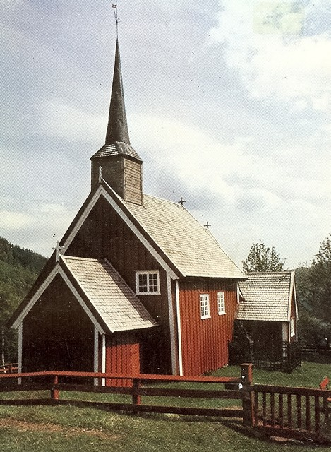 Gløshaug kirke